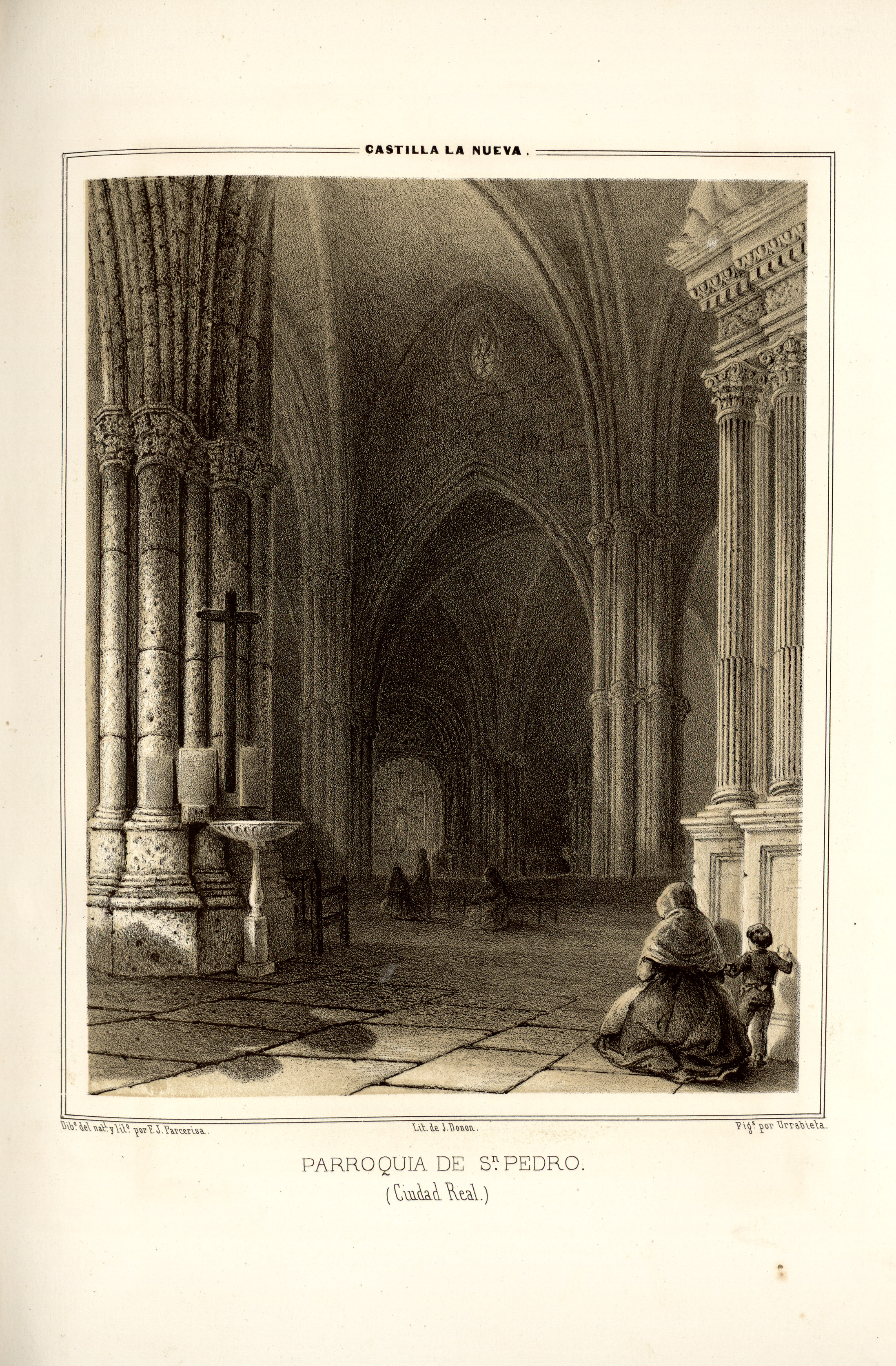 Parroquia de San Pedro (Ciudad Real).